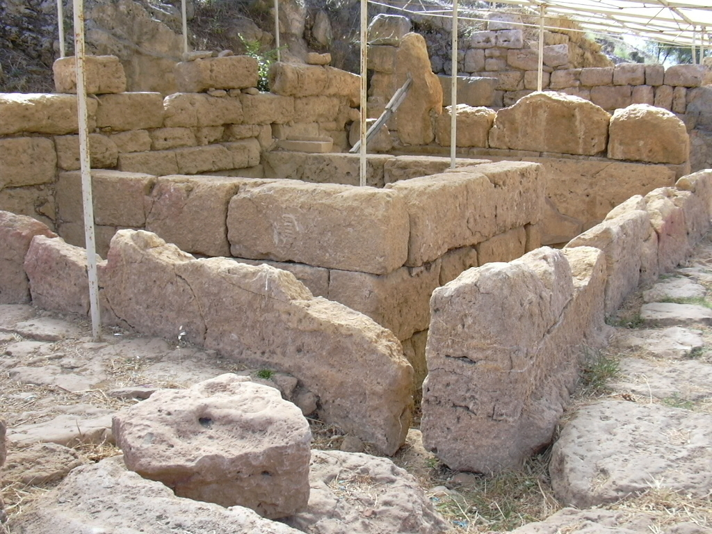 Morgantina: agorà ellenistica. Quasi a coronamento dello stoà est, sul lato nord, sorge la notevole fontana a doppia vasca dedicata alle Ninfe; un esempio interessante per comprendere le tecniche idrauliche dell'epoca.